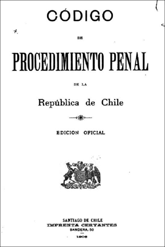 Portada del Código de Procedimiento Penal de la Repúbica de Chile. Primera edición oficial